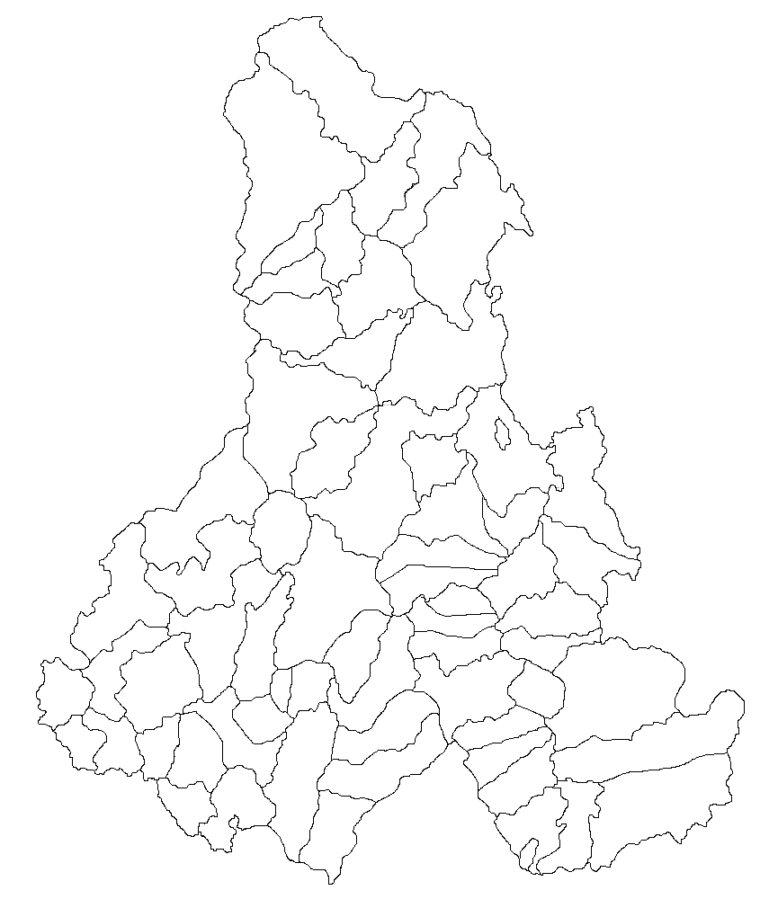 Categorie:Hărţi ale judeţului Harghita